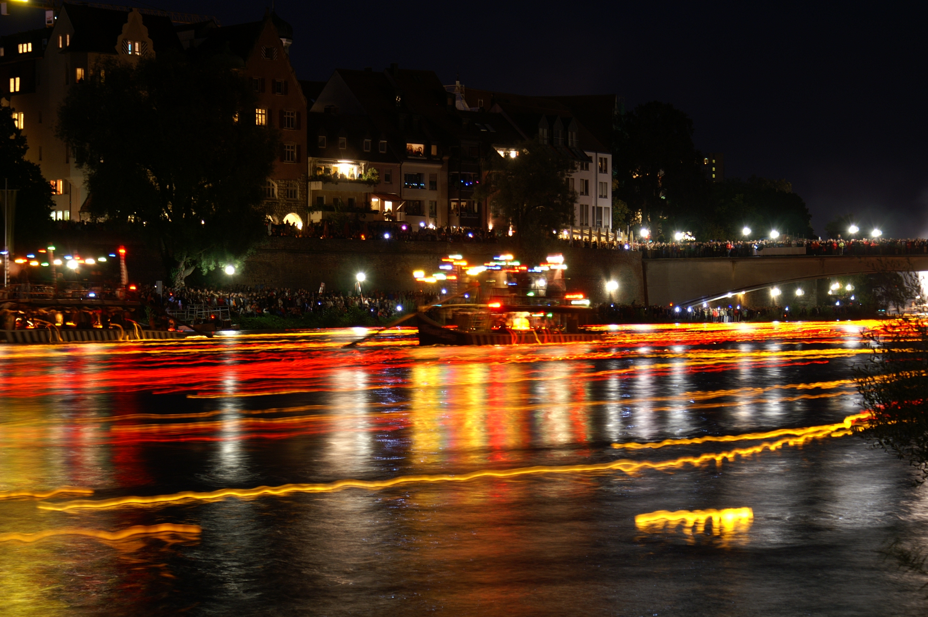 Bei der Lichterserenade auf der Donau werden am Samstag vor Schwörmontag in Ulm bei Einbruch der Dunkelheit tausende Teelichter von mehreren Ulmer Schachteln aus auf das Wasser gesetzt.